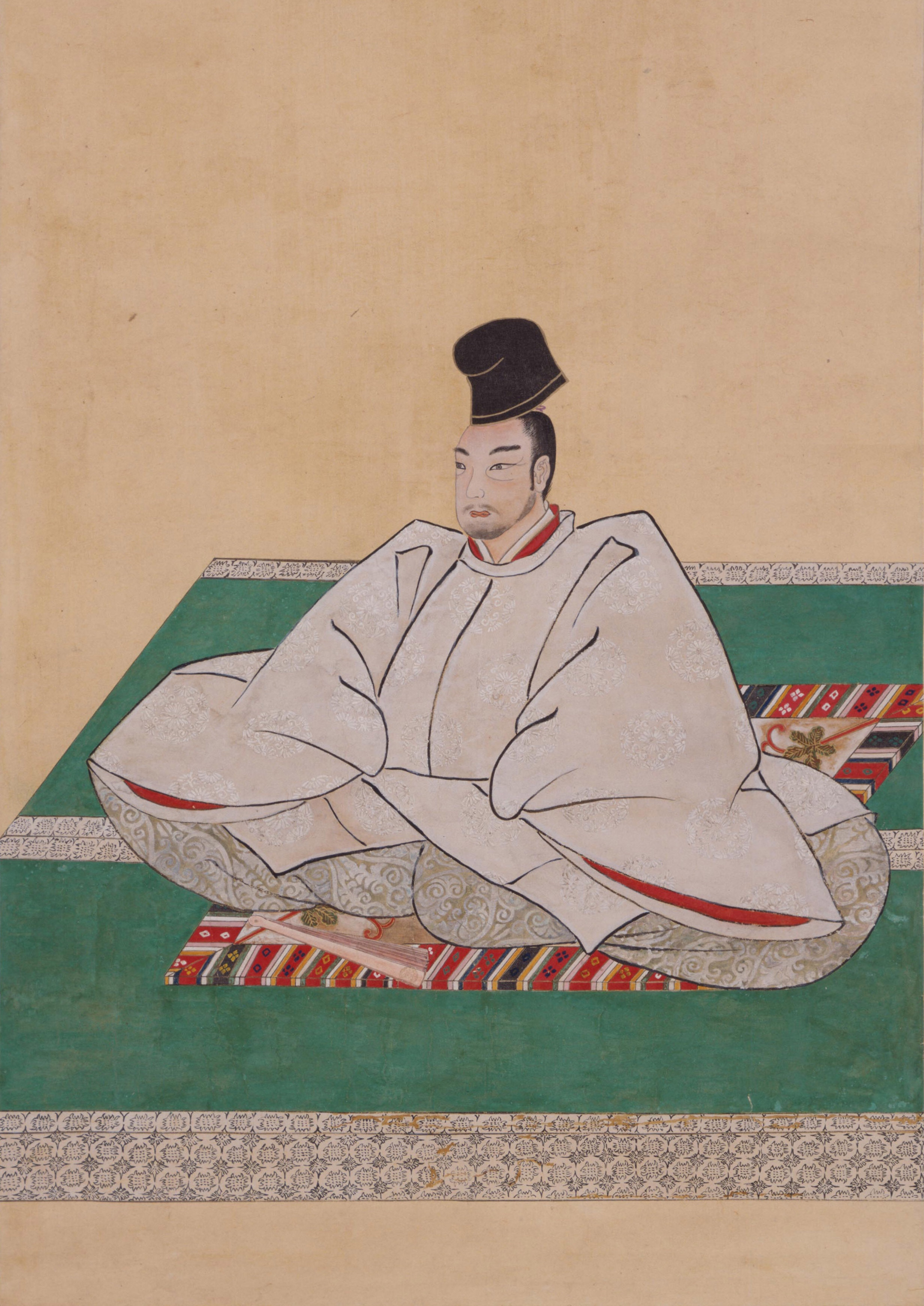 閑院宮直仁親王の肖像画